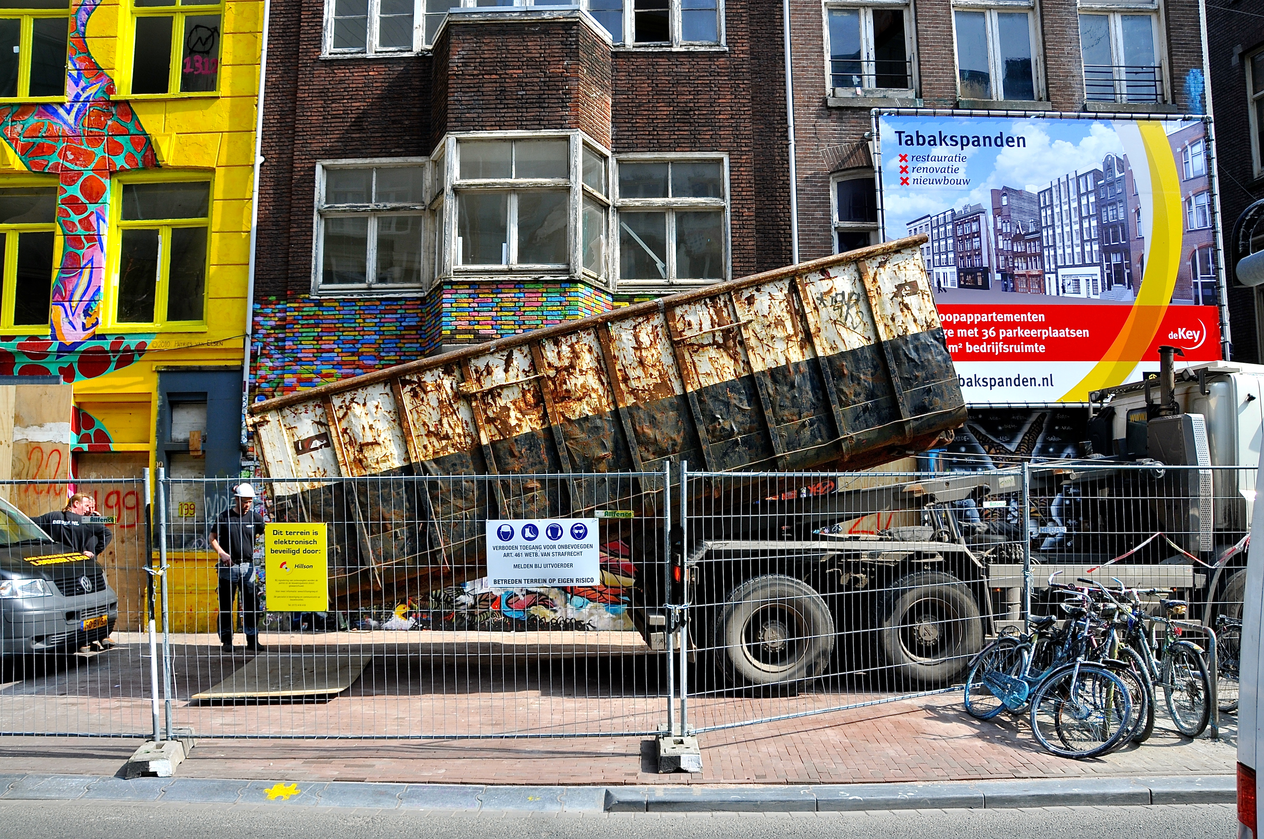 De slopershamer werd afgelopen april driftig gehanteerd in de Spuistraat en Wijdesteeg. De garage en aanliggende krakerspanden worden gesloopt en vervangen door koopappartementen en bedrijfsruimten.